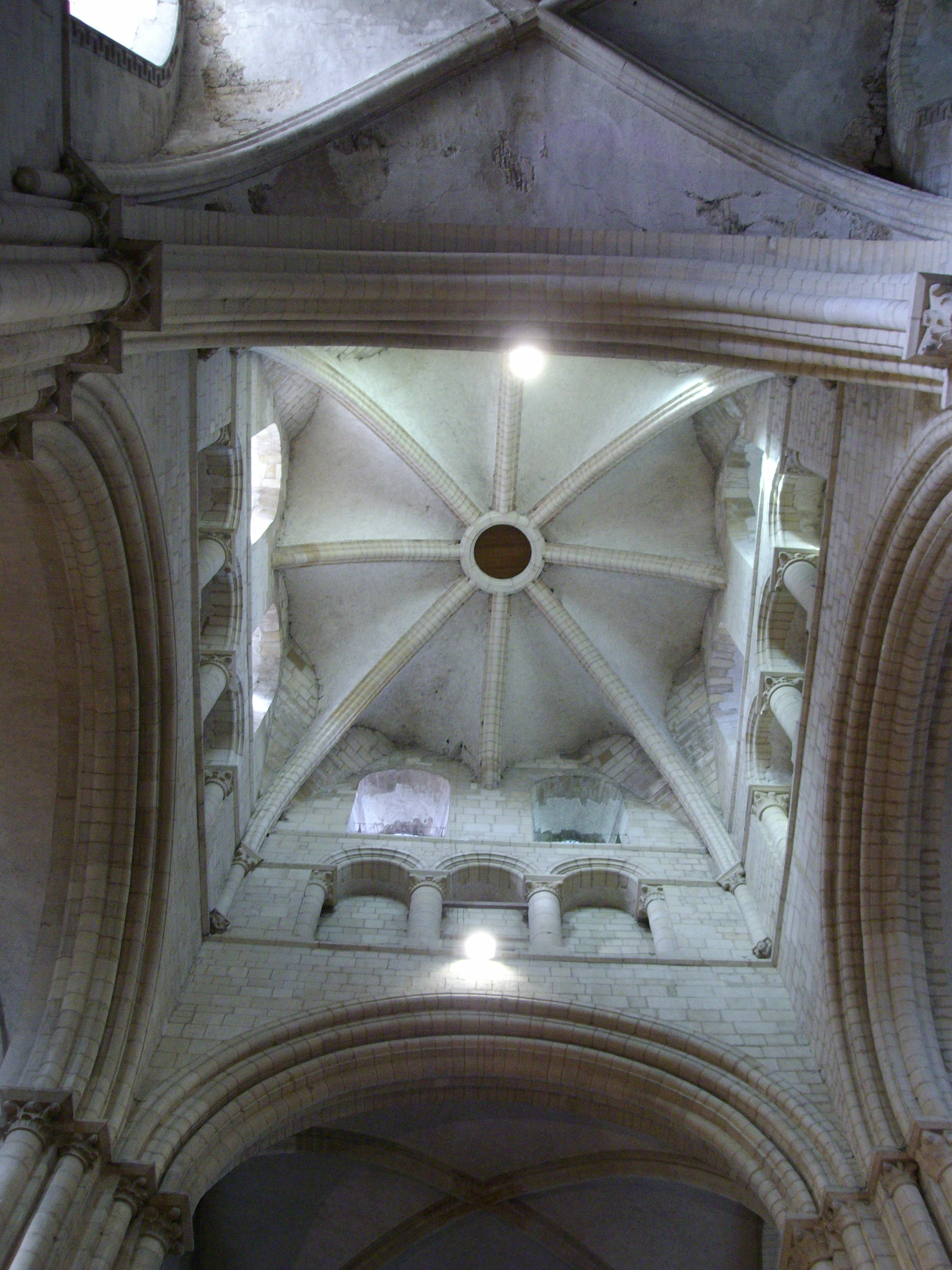 croisée du transept de l'église Saint-Étienne de l'ancienne abbaye aux Hommes de Caen (Calvados, Basse-Normandie). Au-dessus de chacune des quatre arcades de la croisée: un triplet en plein cintre de baies qui semblent aveugles mais ménagent un étroit passage tout autour de la croisée